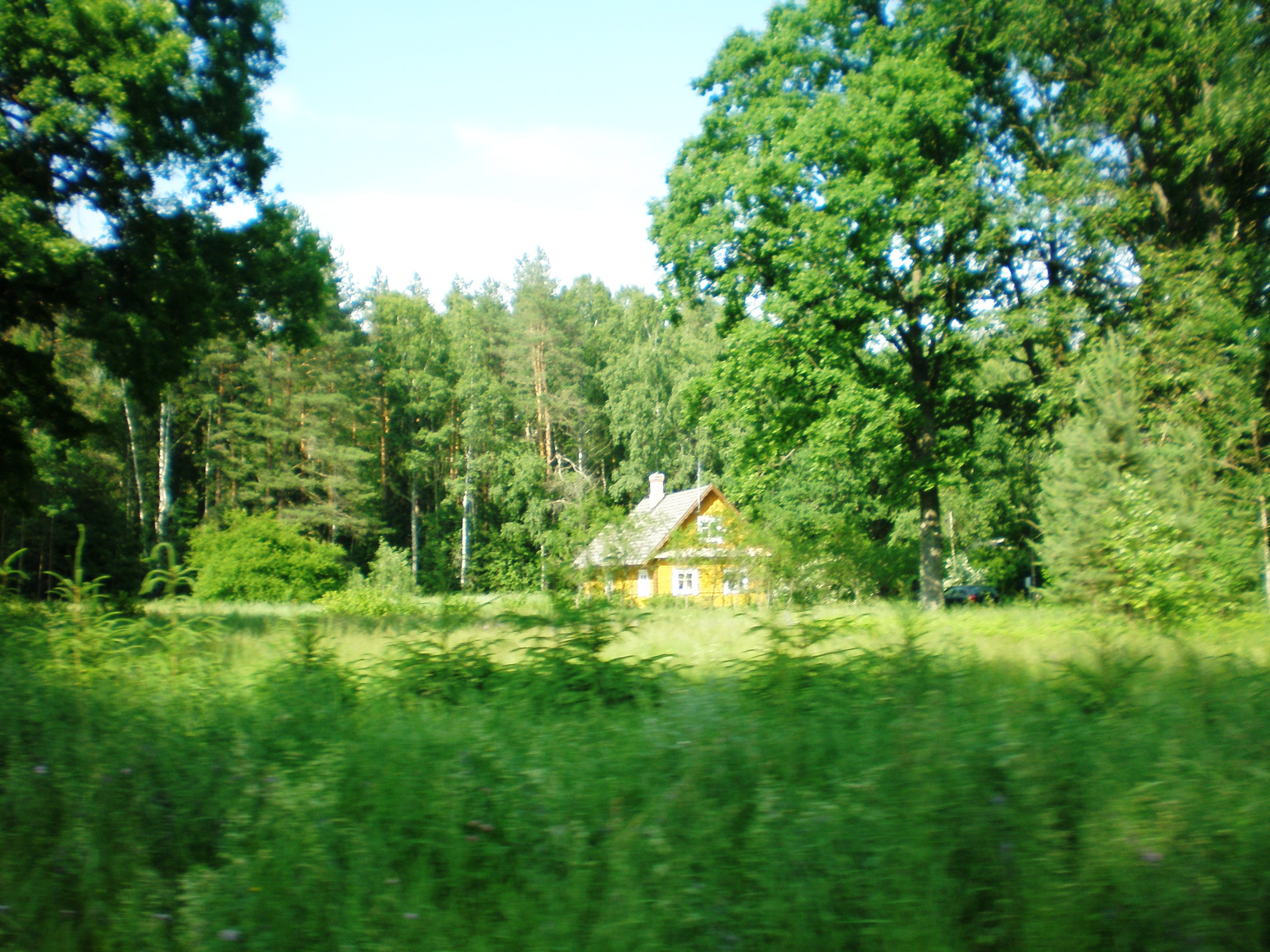 Palkabalis, Kaniavos sen., Varėnos raj.